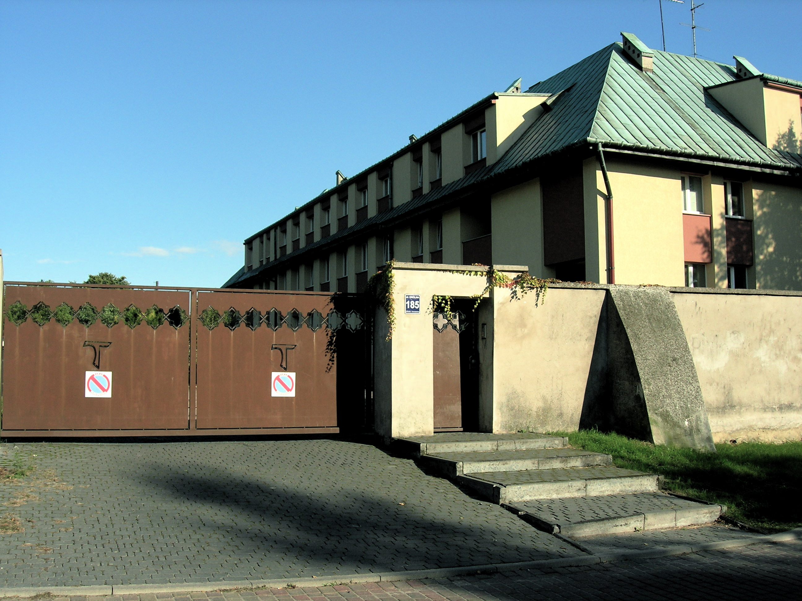 Wyższe Seminarium Duchowne oo. Franciszkanów